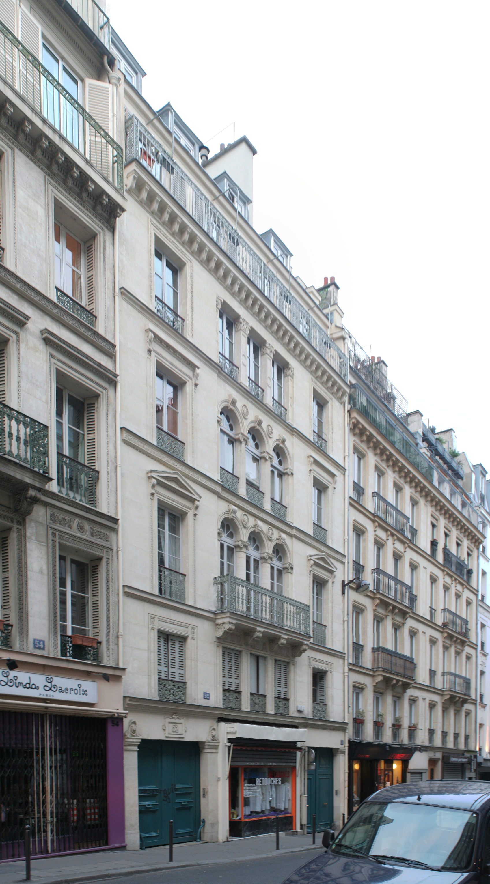 Vue d'ensemble du 50-52 rue Notre-Dame-de-Lorette.